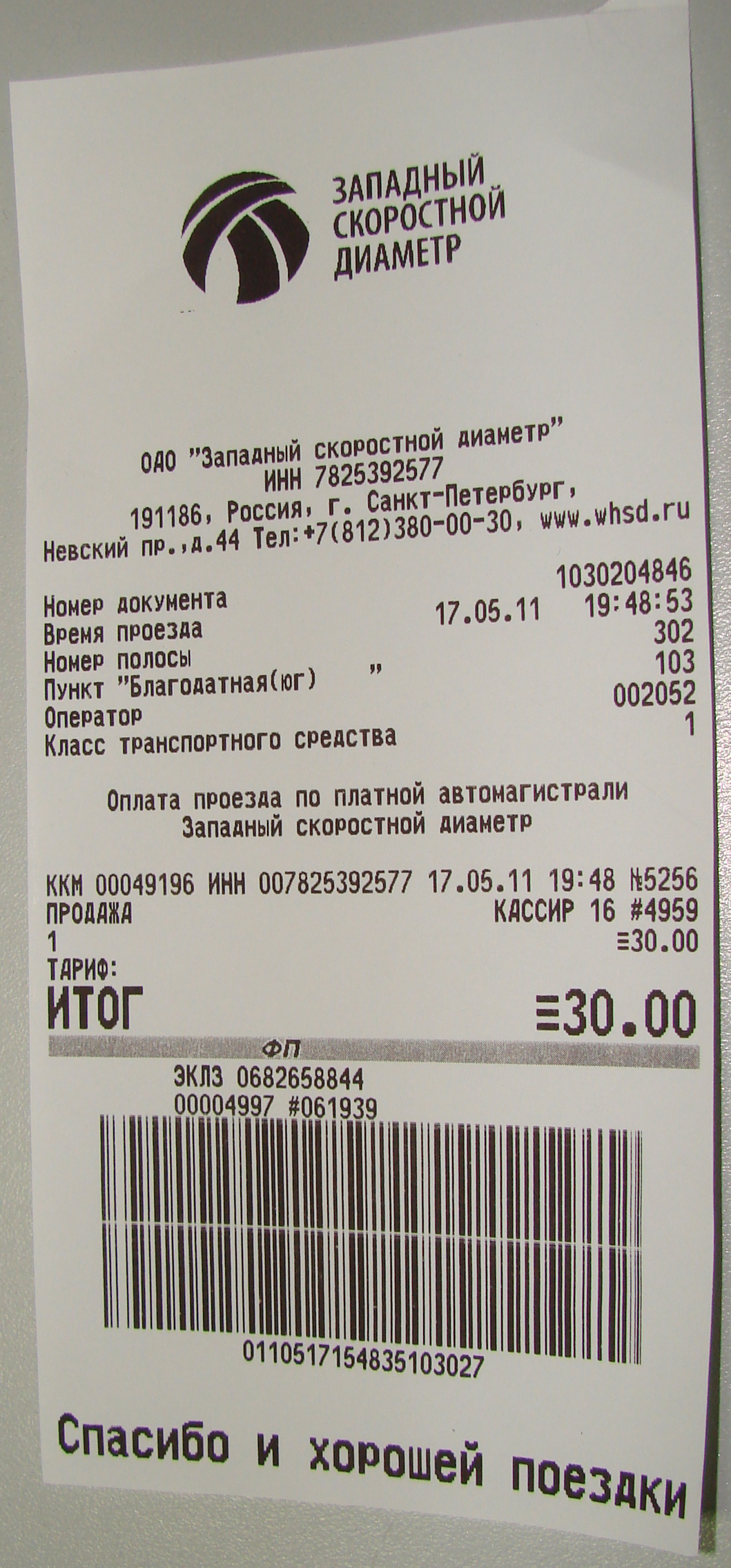 Чек платы за проезд на Западном скоростном диаметре